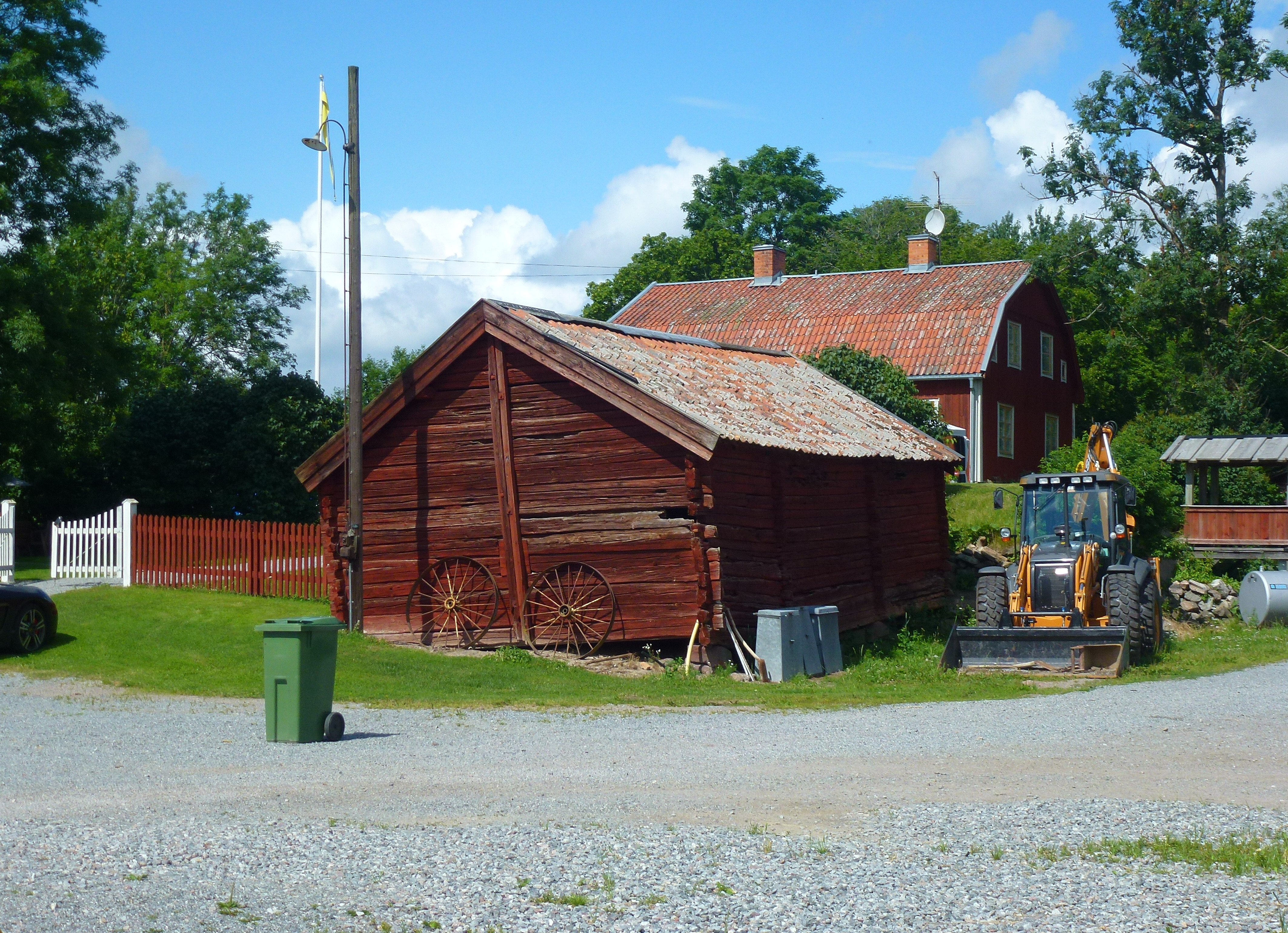 Bögs gård